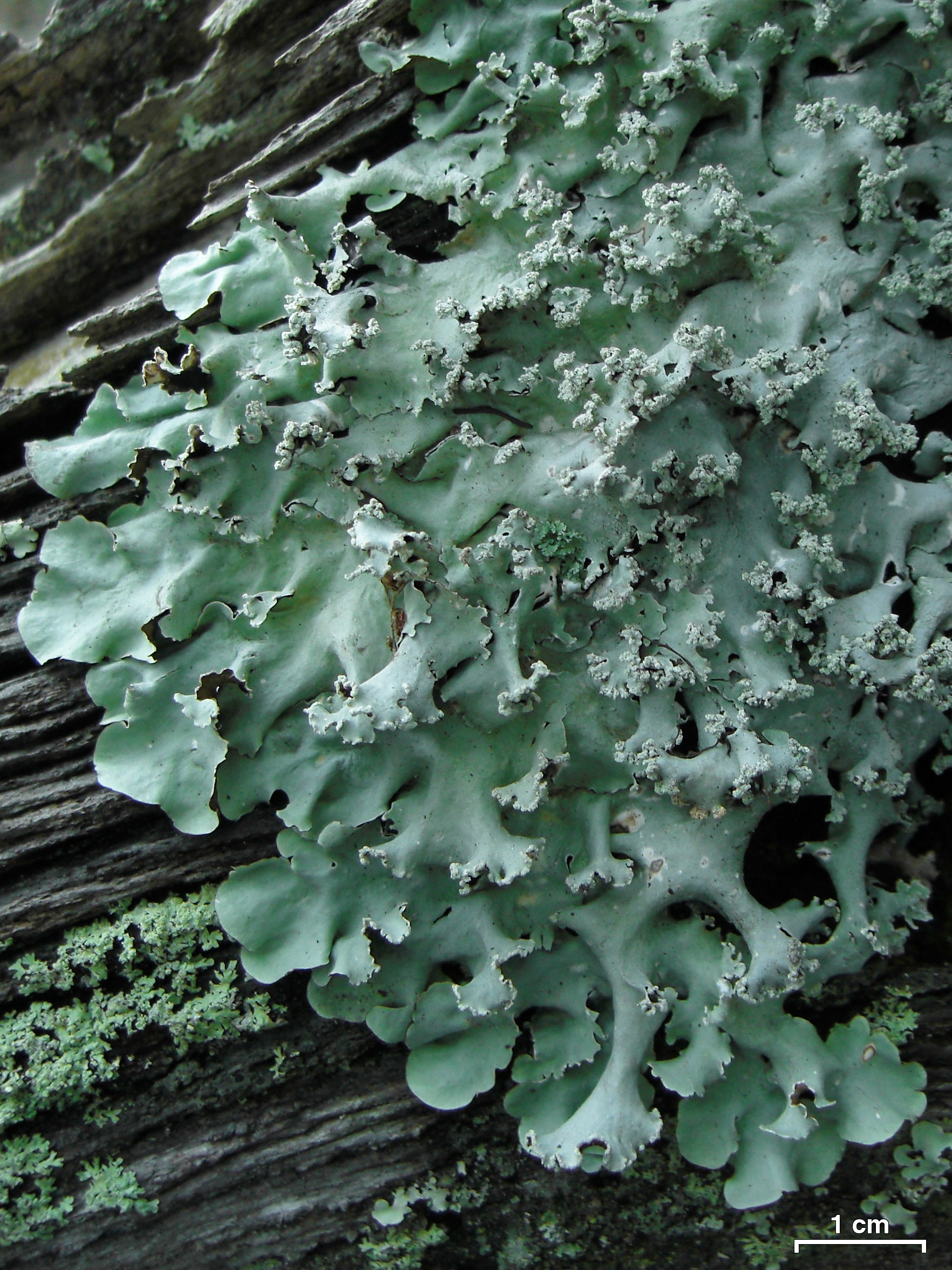 Georgia coast, 20131215